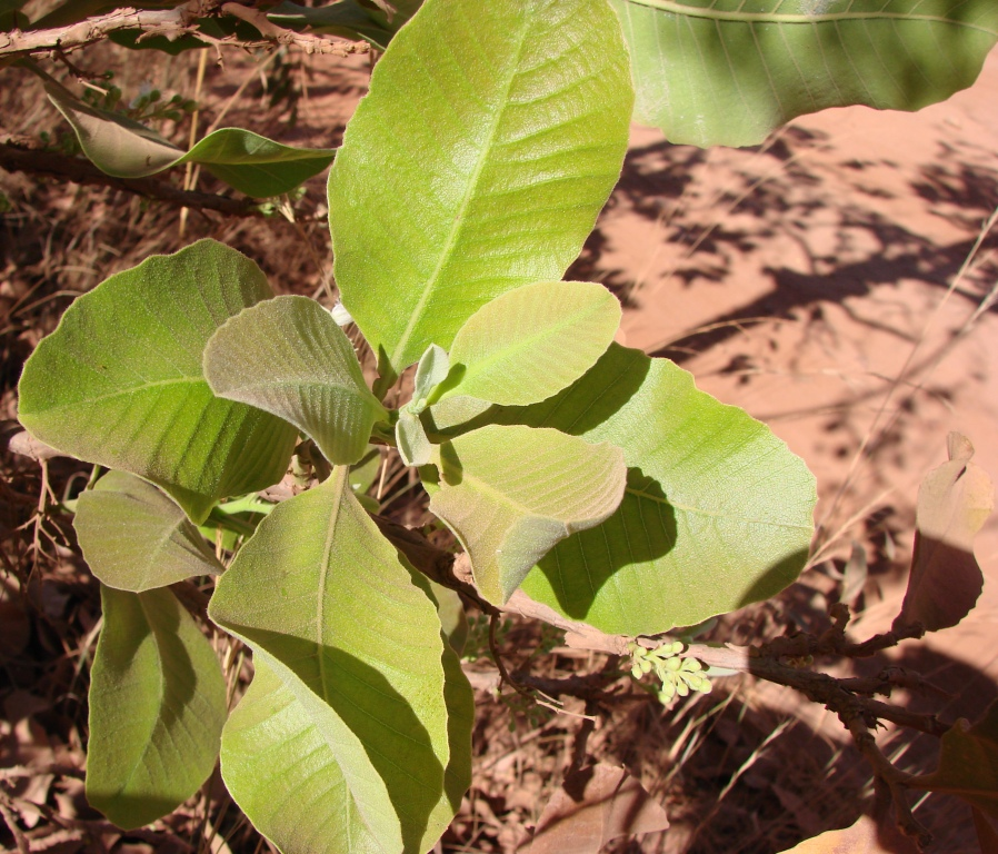 Curatella americana - DILLENIACEAE Parque Nacional do Grande Sertão Veredas - Chapada Gaúcha - Minas Gerais - Brasil.